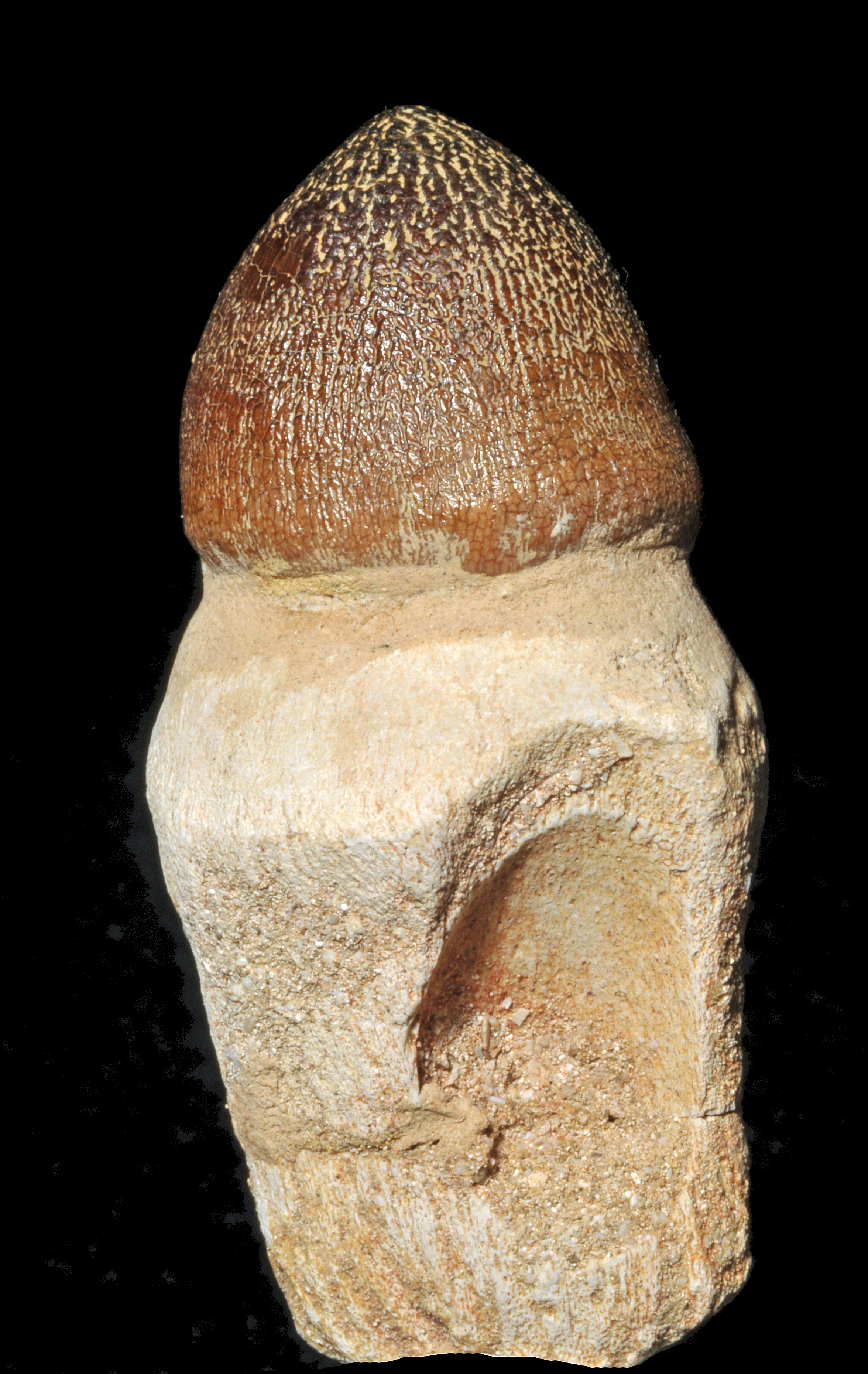 dent de Globidens aegyptiacus. La couronne dentaire montre bien le mode "broyeur" chez ce Mosasaure. A noter la cavité, vide, d'une dent de remplacement.